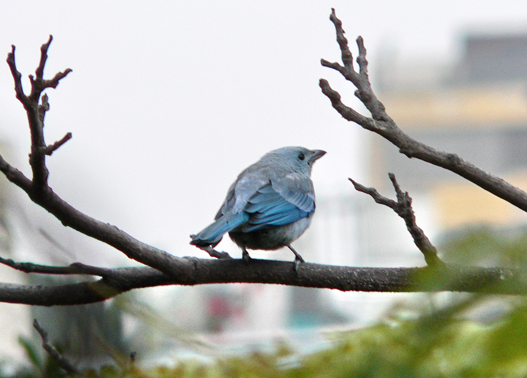 Thraupis Episcopus, Tángara Azuleja, ave peruana tomada en el Olivar de San Isidro. Foto de Manuel González Olaechea y Franco